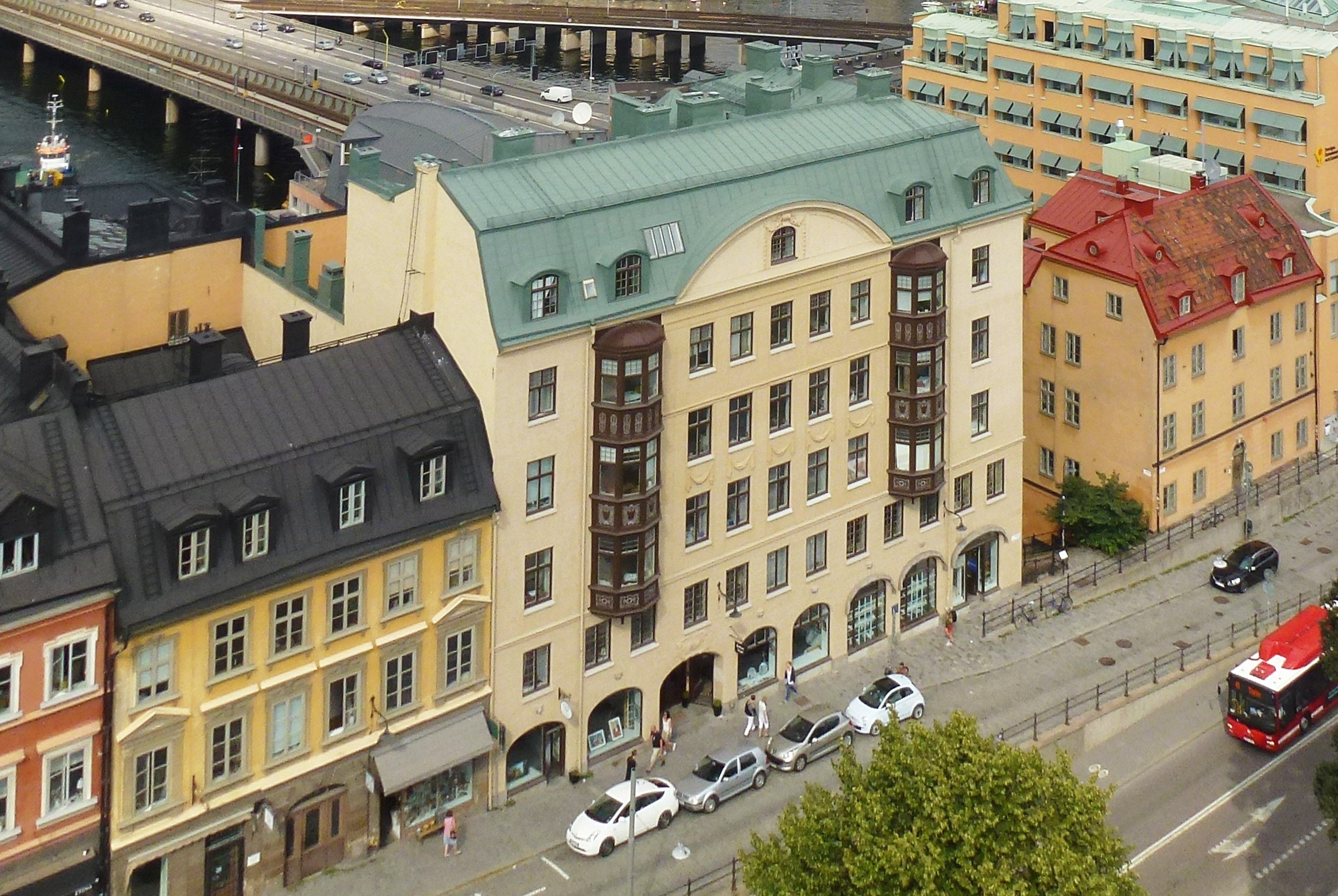 Hornsgatan 26 (Stenbocken 7) och Horngatan 28 (Stenbocken 8)